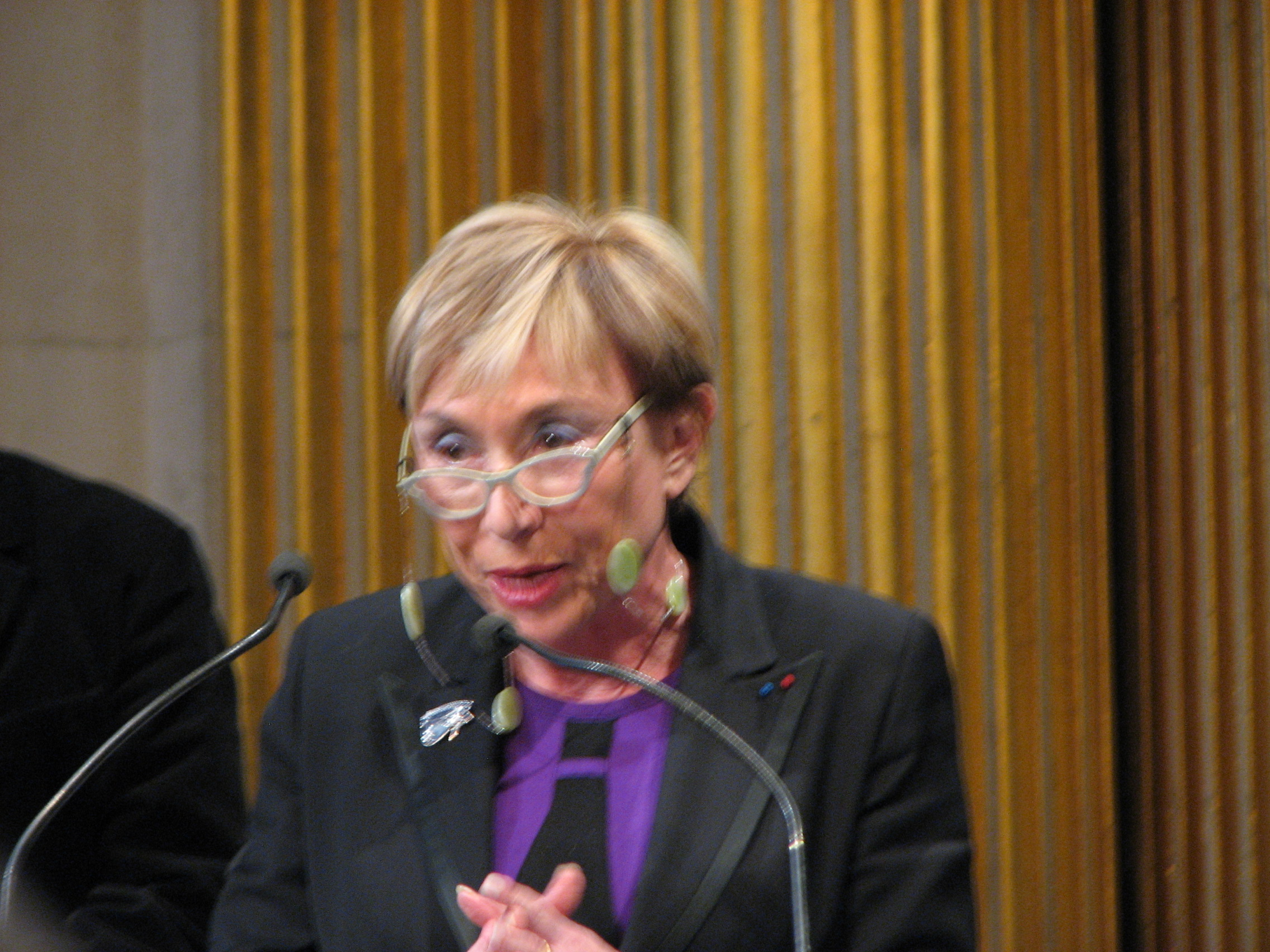 Julia Kristeva lors de la soirée "Paris de la Recherche"